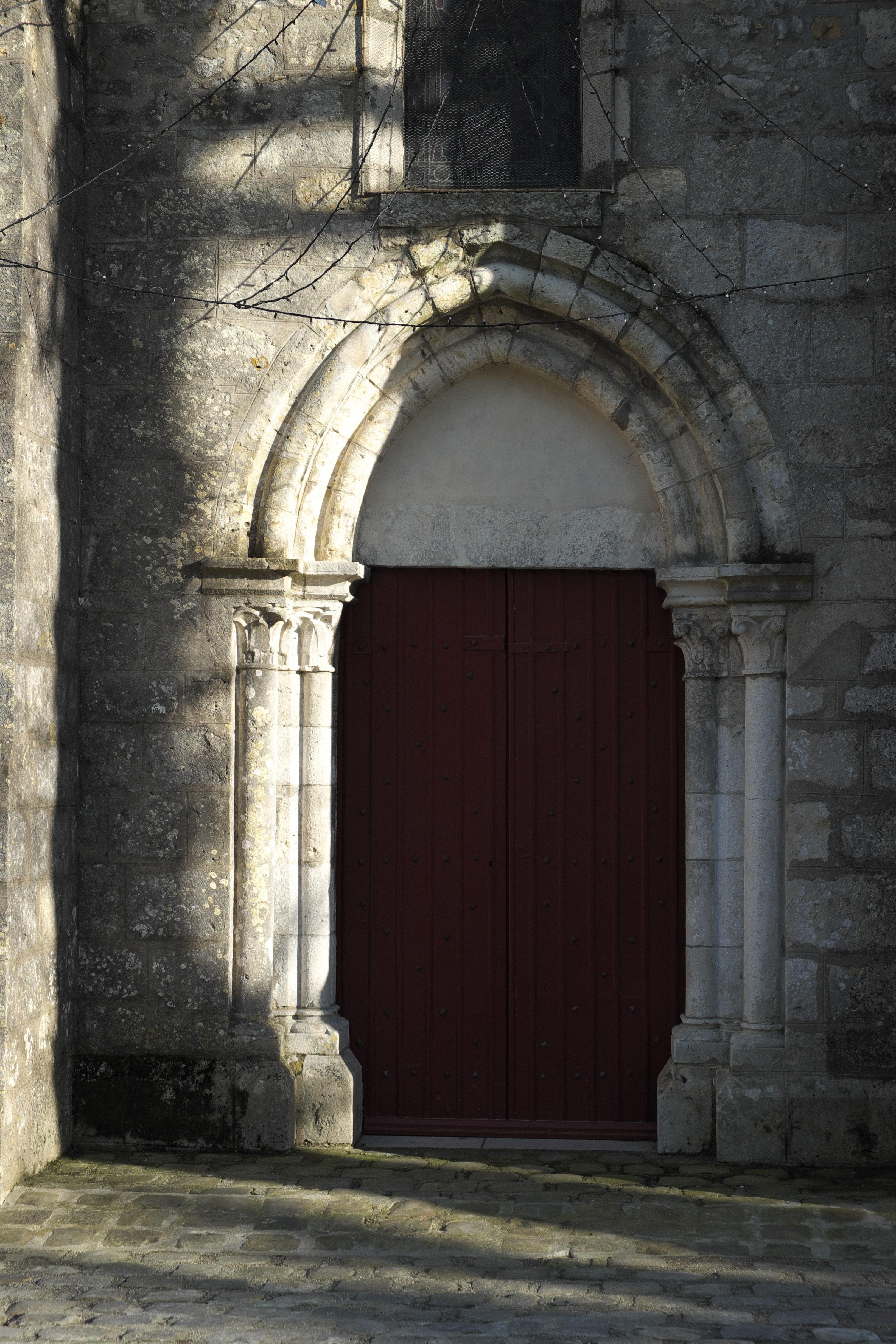 Katholische Kirche Saint-Pierre-et-Saint-Paul in Saint-Pierre-lès-Nemours im Département Seine-et-Marne in der Region Île-de-France (Frankreich), romanisches Portal